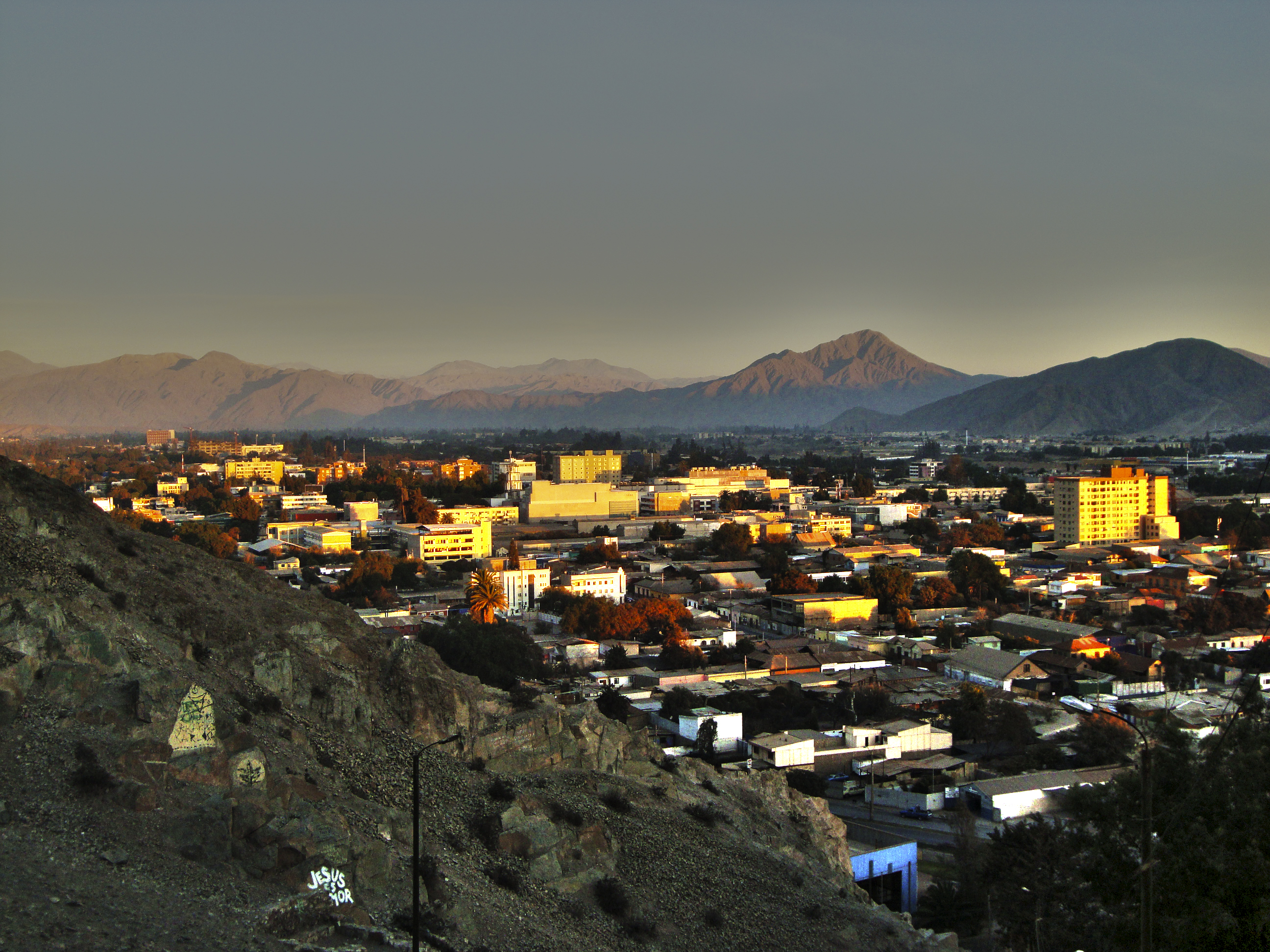 Vista de Copiapó desde el cerro La Cruz.